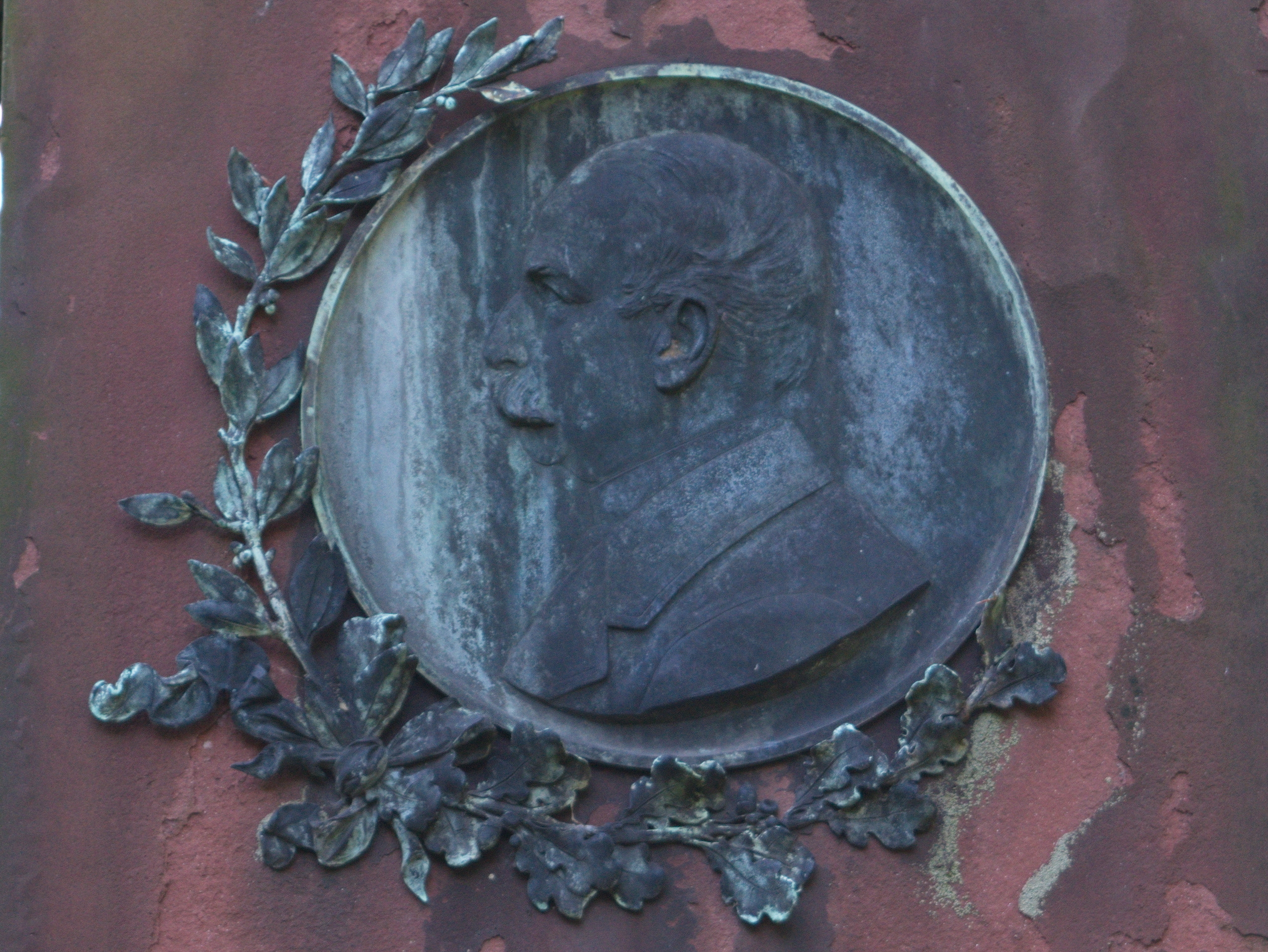 Hochstraße, Wuppertal